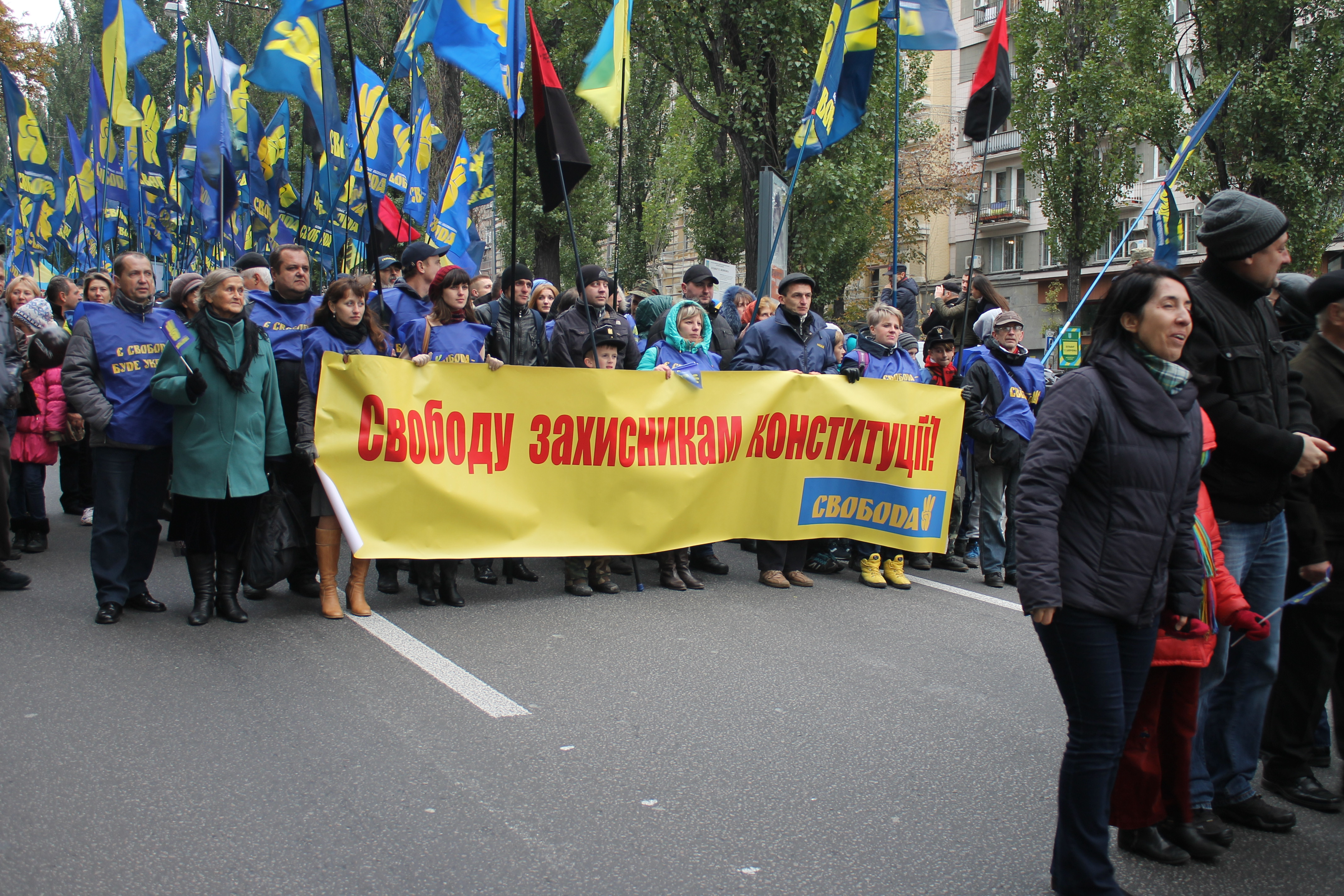 Марш з нагоди 74-ї річниці УПА, Київ